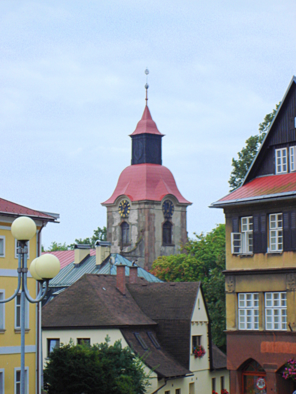 Žacléř, Rýchorské náměstí, Kostel Nejsvětější Trojice